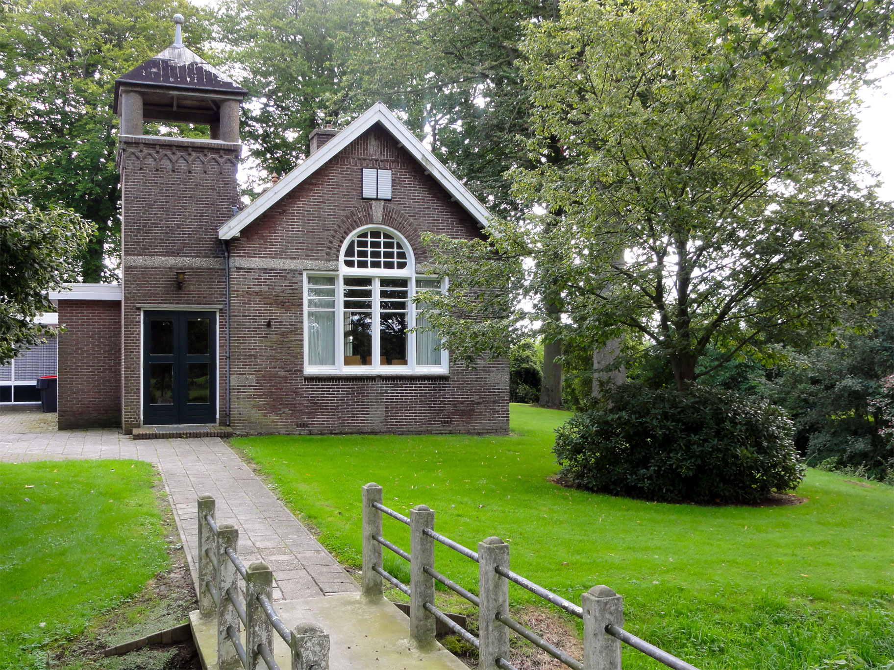 Verenigingsgebouw Torenlaan 12 It_Heechsan